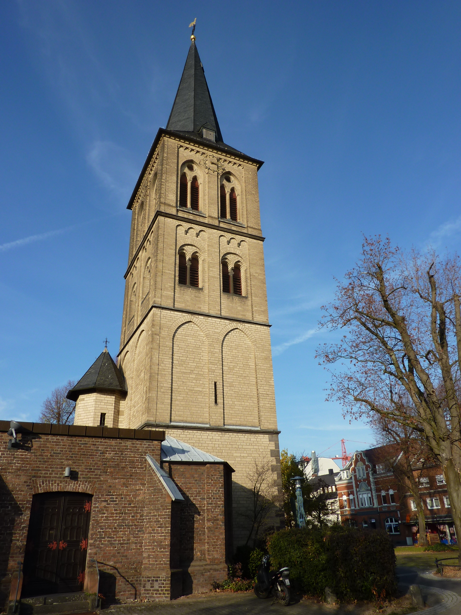 St. Michael (Dormagen)